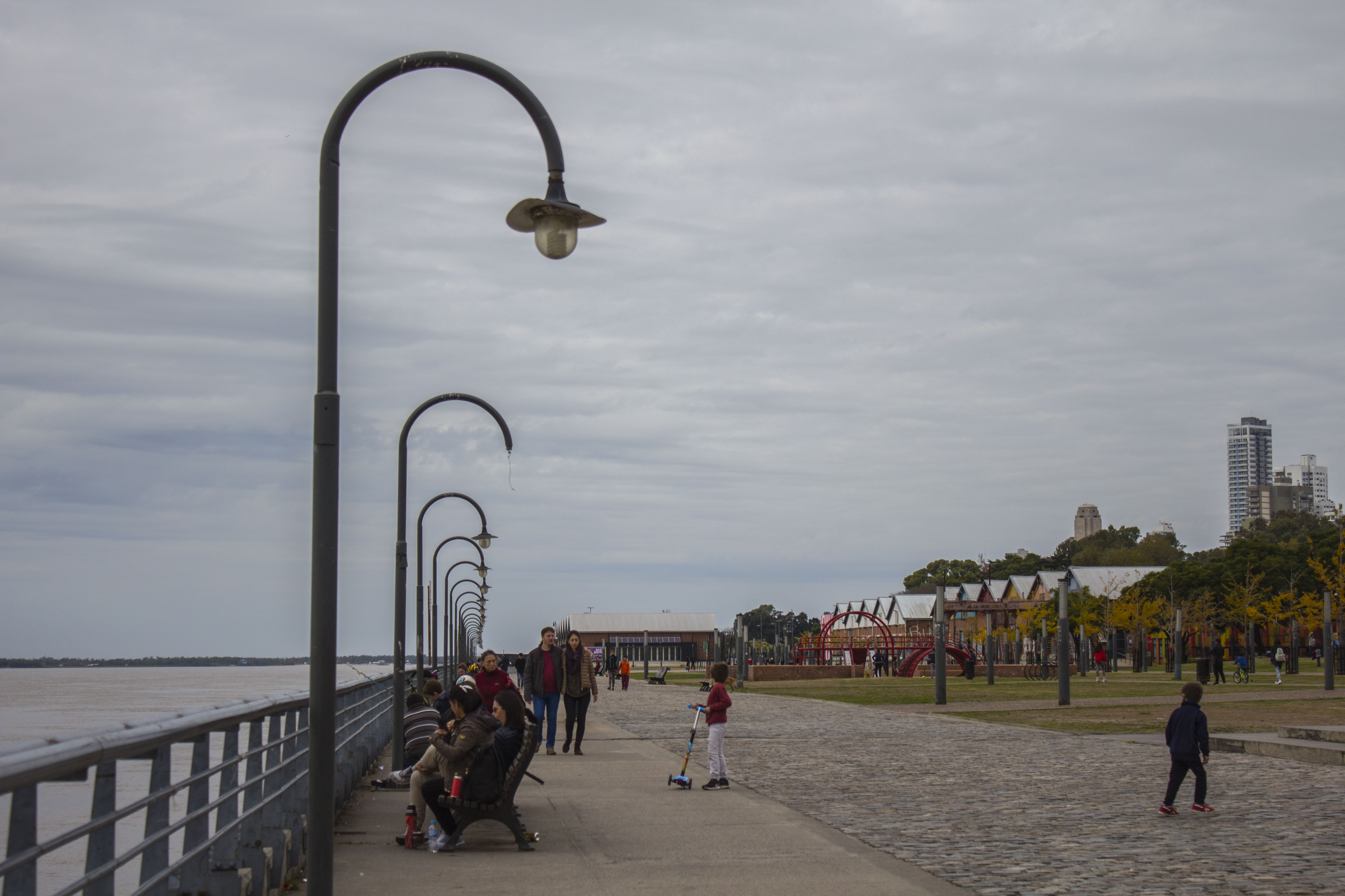 Paseo de la costanera Del Río Paraná, Rosario, Argentina.